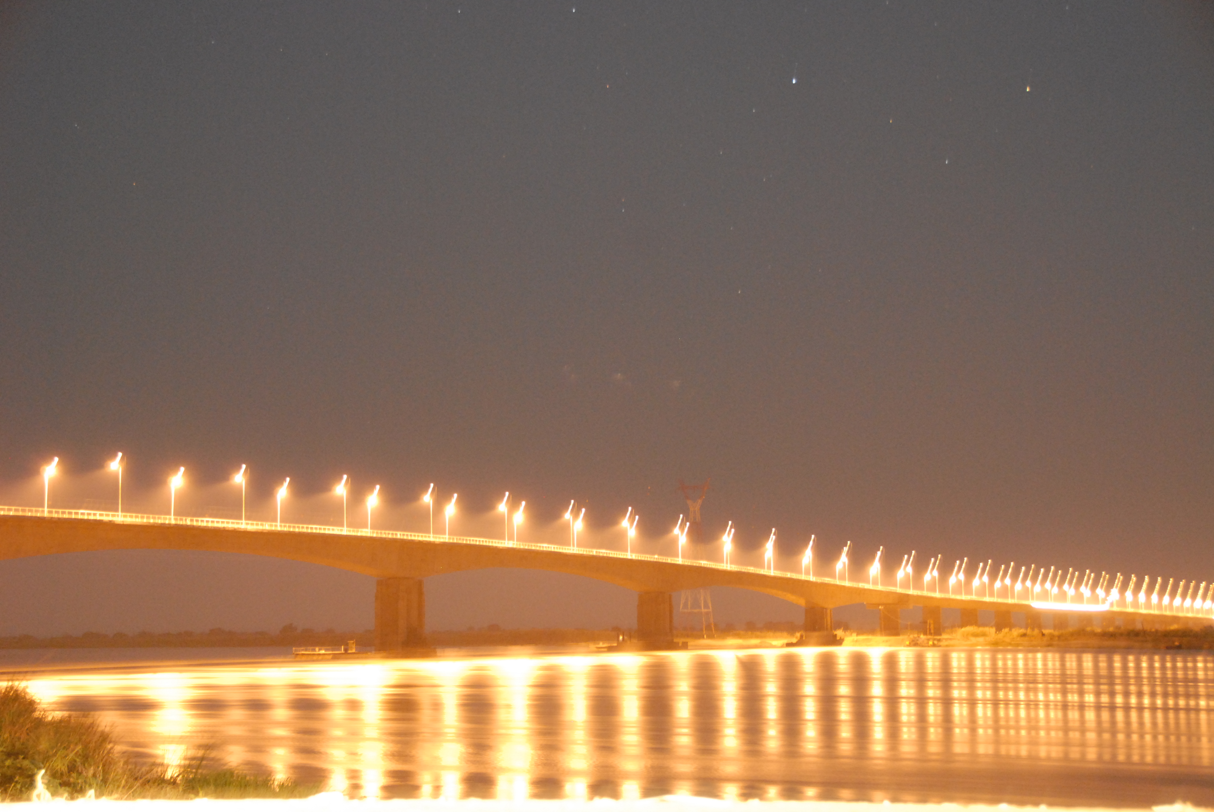 Ponte Armando Emilio Guebuza sobre o Rio Zambeze